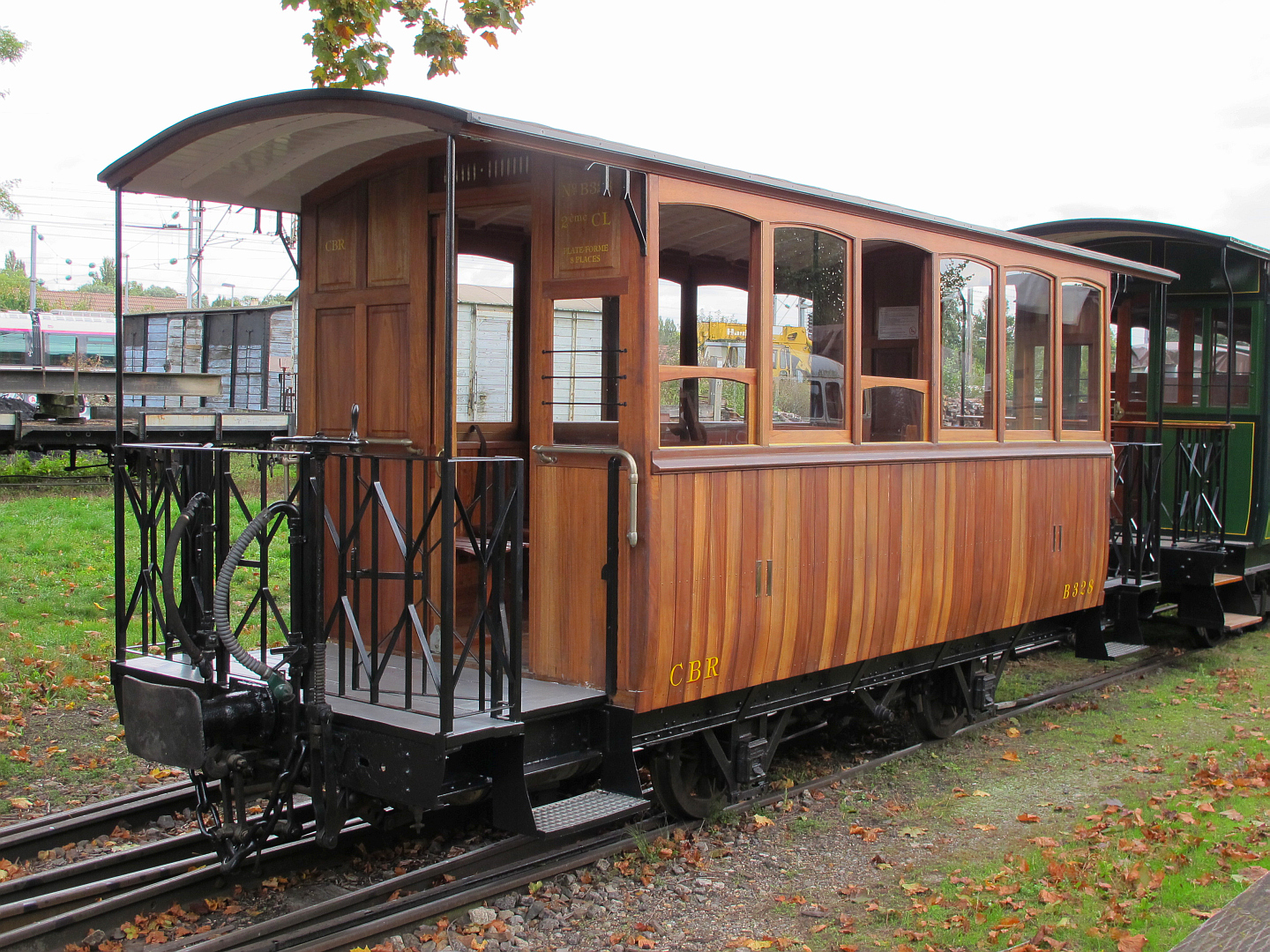 La voiture N° B328 des chemins de fer de la Banlieue de Reims (CBR), au Musée des tramways à vapeur et des chemins de fer secondaires français, à Butry-sur-Oise le 5 octobre 2013.